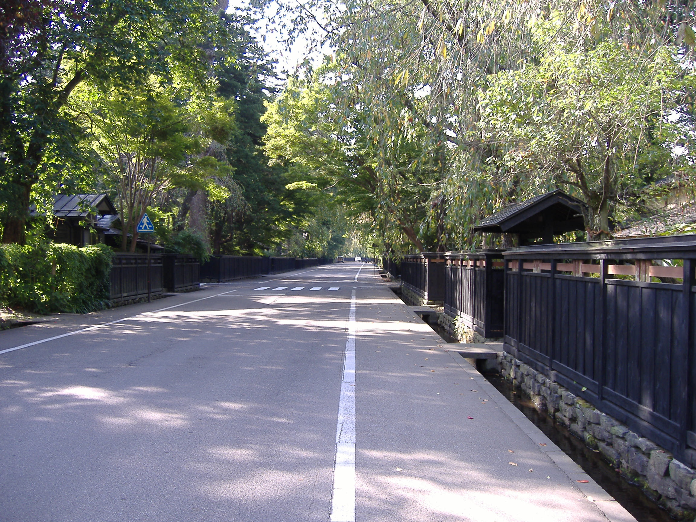 秋田県仙北市角館町の武家屋敷通り